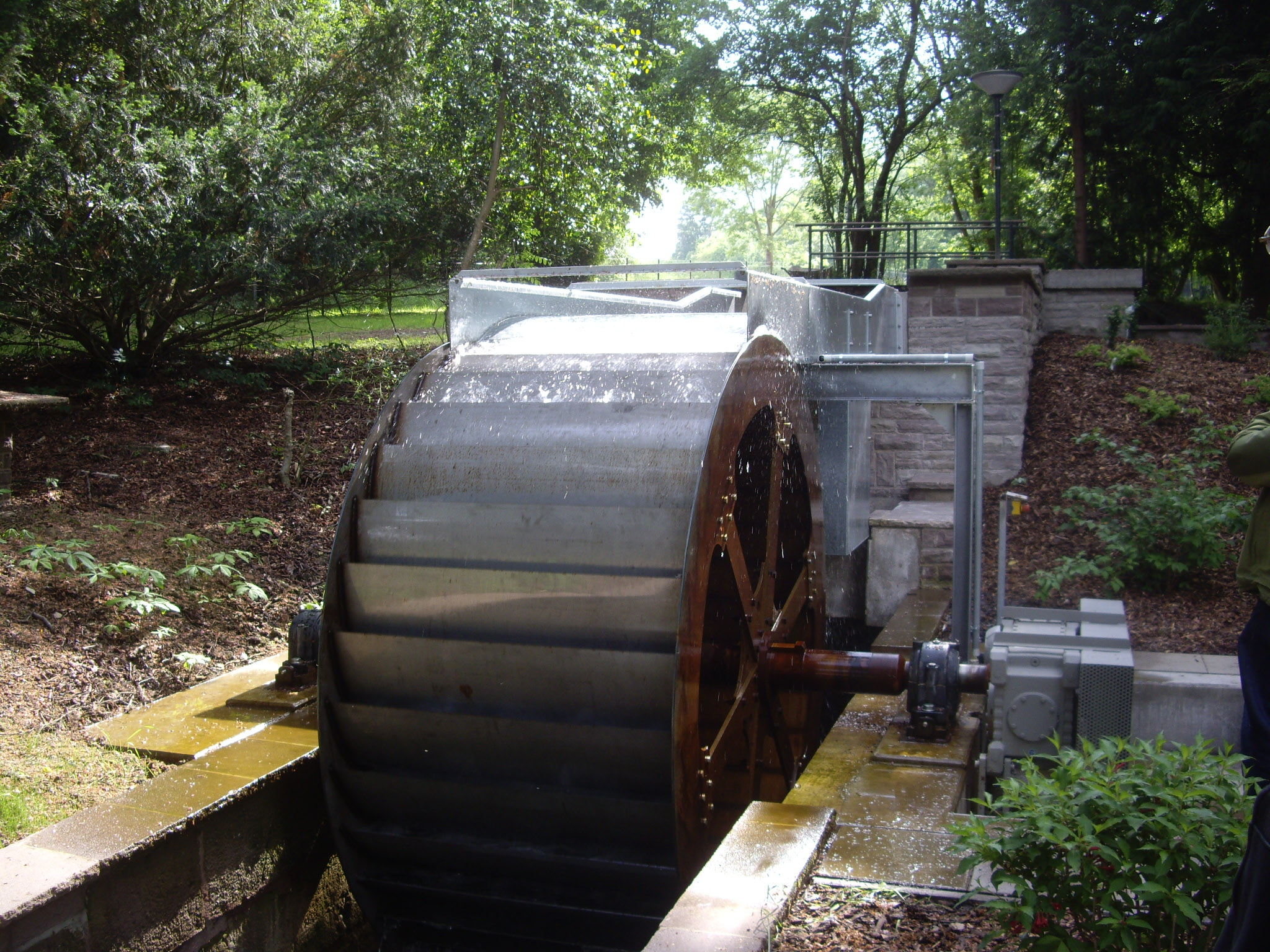 Wasserrad unterhalb der Grone-Quelle (Gronespring), betrieben von den Stadtwerken Göttingen. Rechts die Turbine zur Stromerzeugung. Leistung 5-5,5 kW.